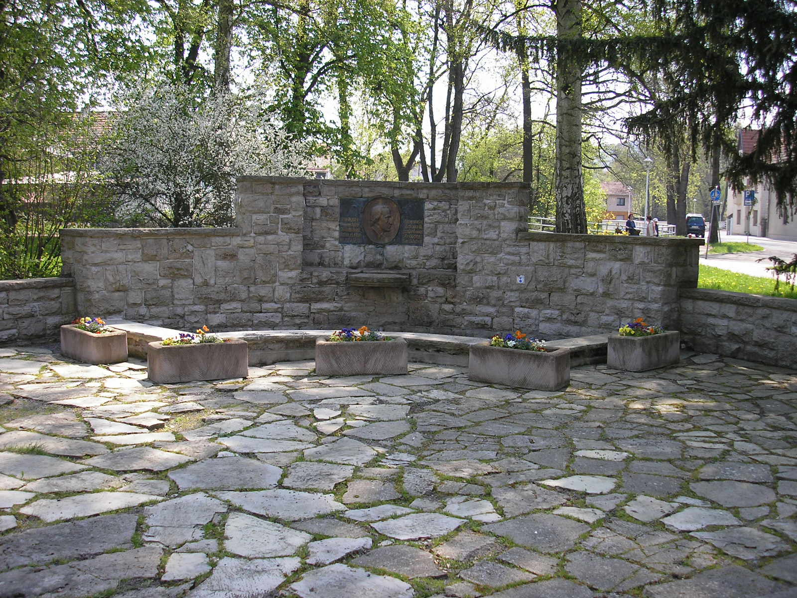 Denkmal zu Ehren von Heinse im Langewiesener Ilmpark.